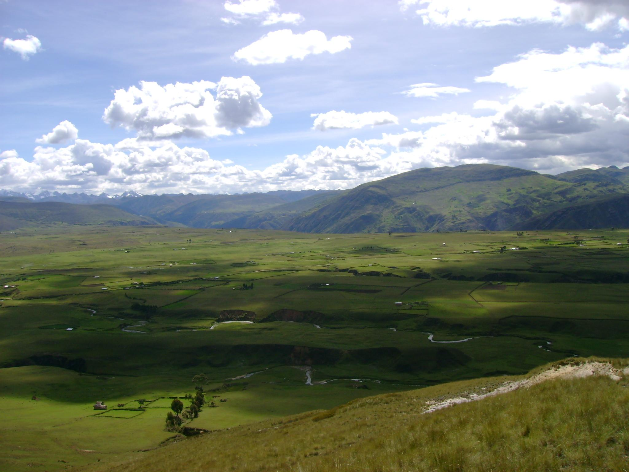 Cerro Liriopampa, desde Chayhuapunta